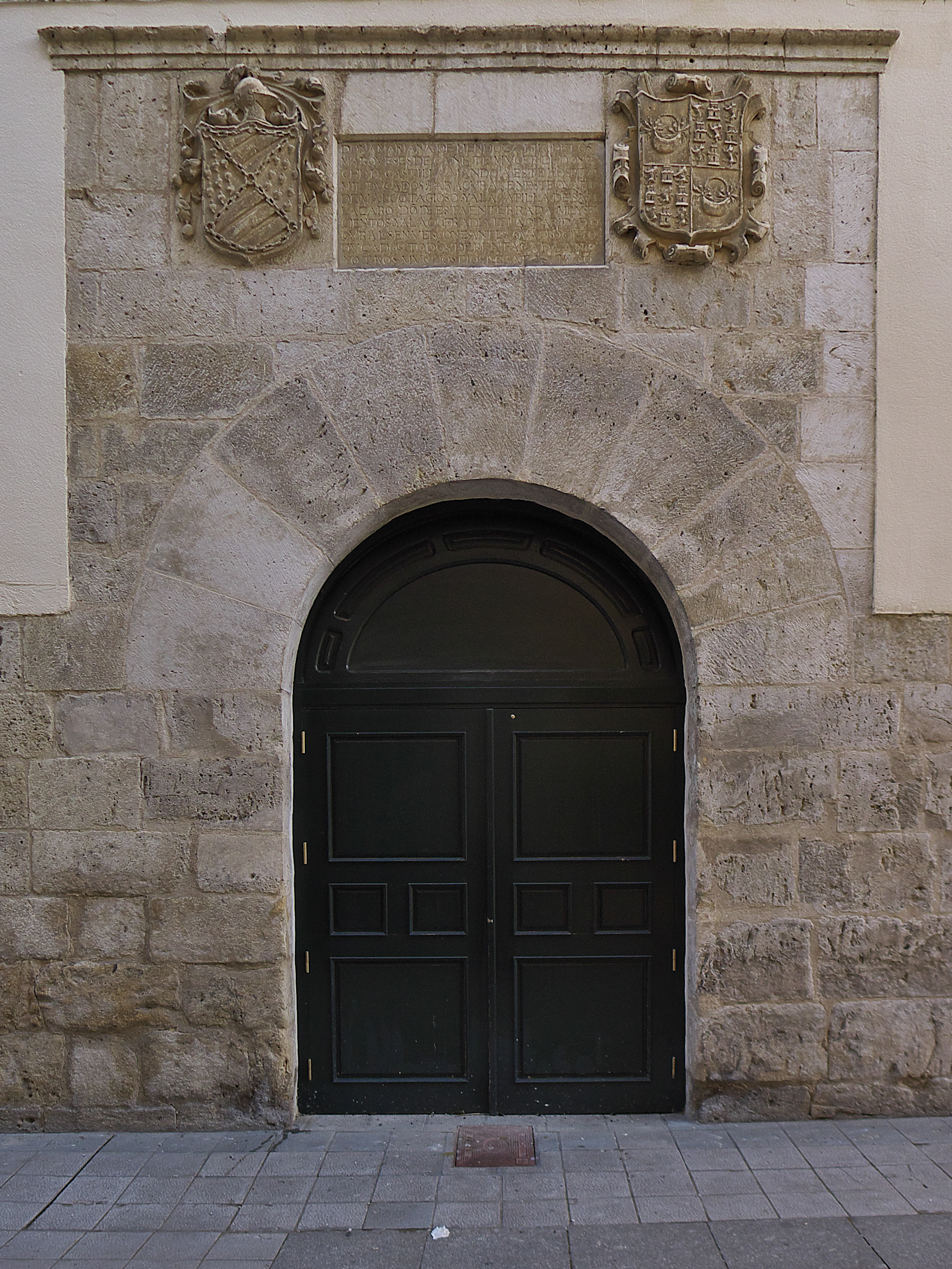 Mariana de Mendoza (+1580), hija del II Marqués de Cañete, Andrés Hurtado de Mendoza y de Magdalena de Manrique, esposa de D. Sancho de Castilla, señor de Bolodui y Herrera del Val de Cañas, patrocinó al Hospital de San Bernabé (Palencia).